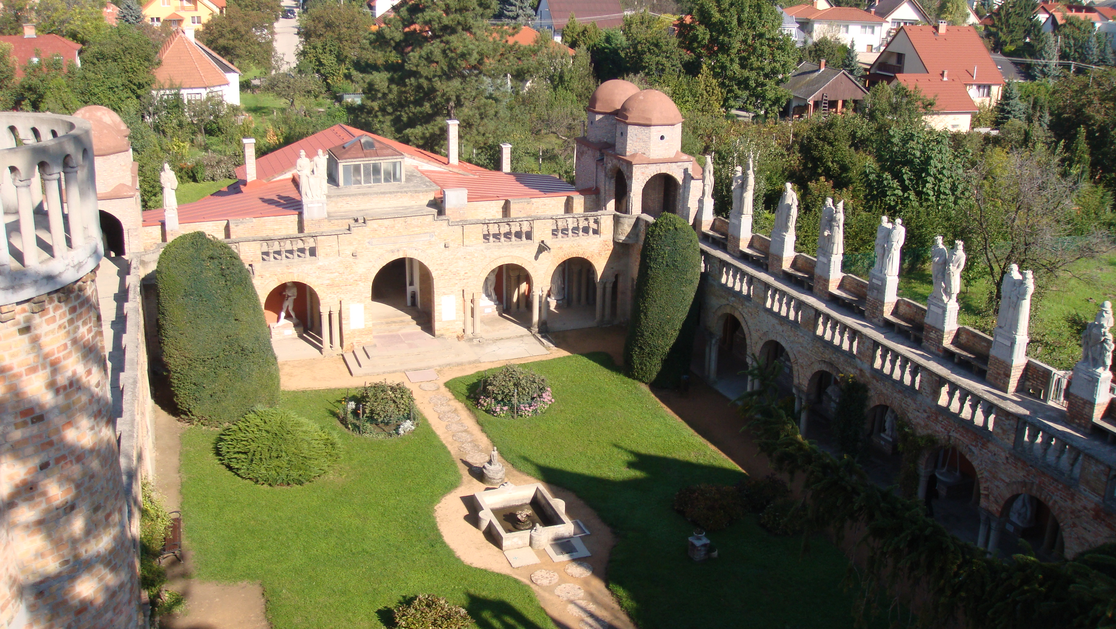 Замок любви-5 с башни